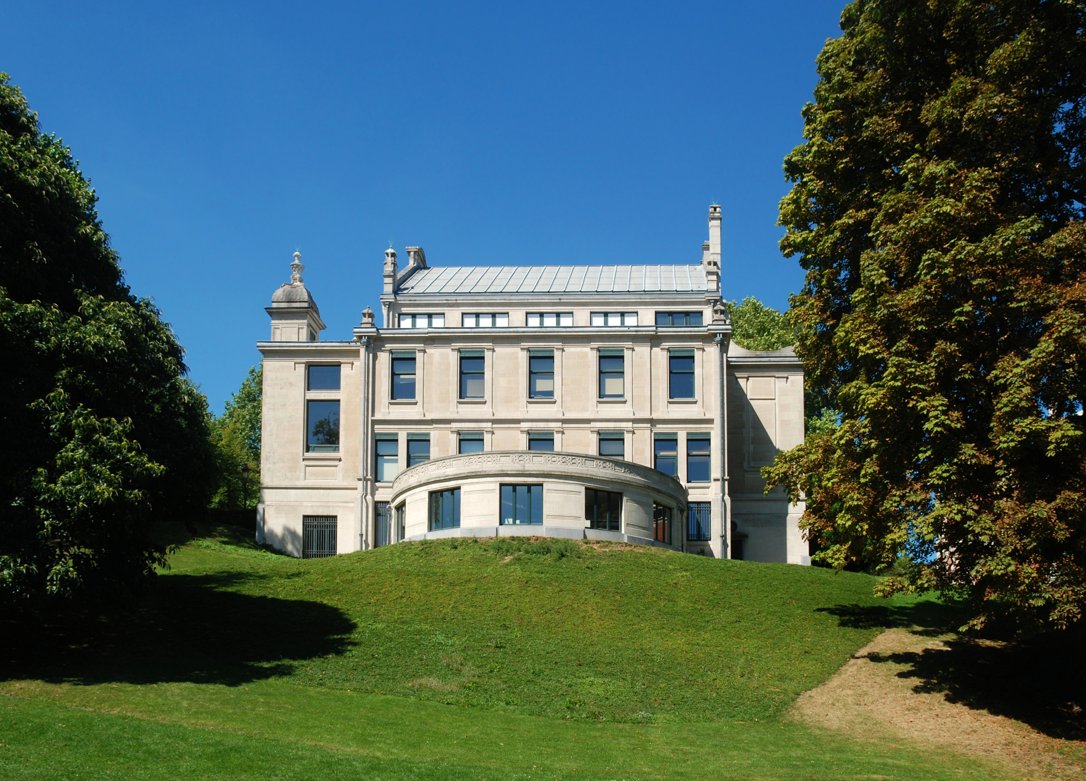 Belgique - Bruxelles - Bibliothèque Solvay